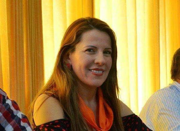 María Susana Portela, alcaldesa de Florencia (Caquetá) en el período 2012-2015.